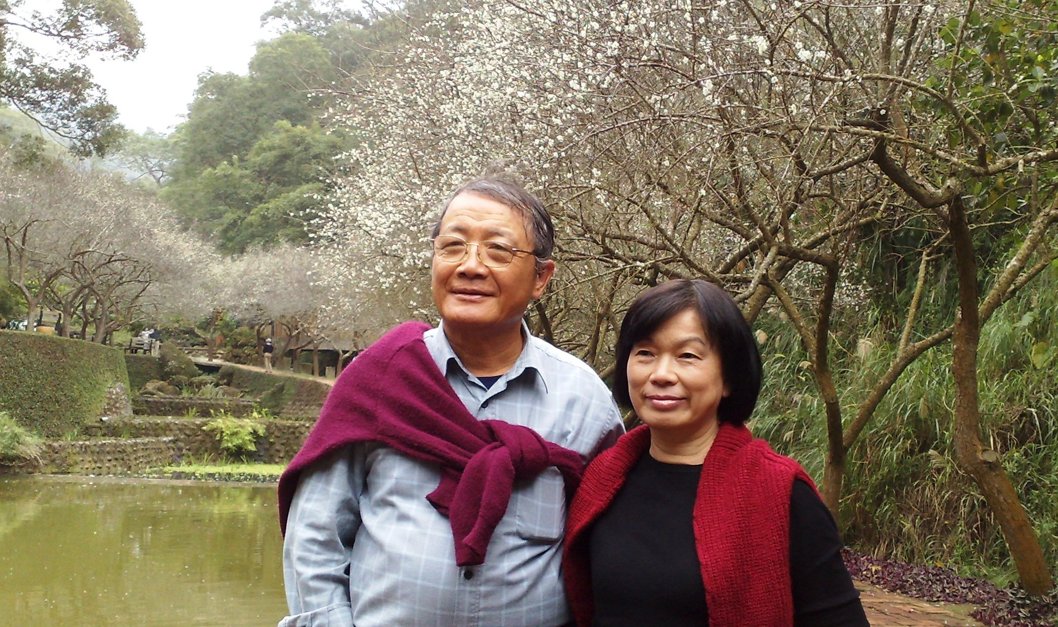 中文（台灣）: 華陶窯主-陳文輝&龍應台